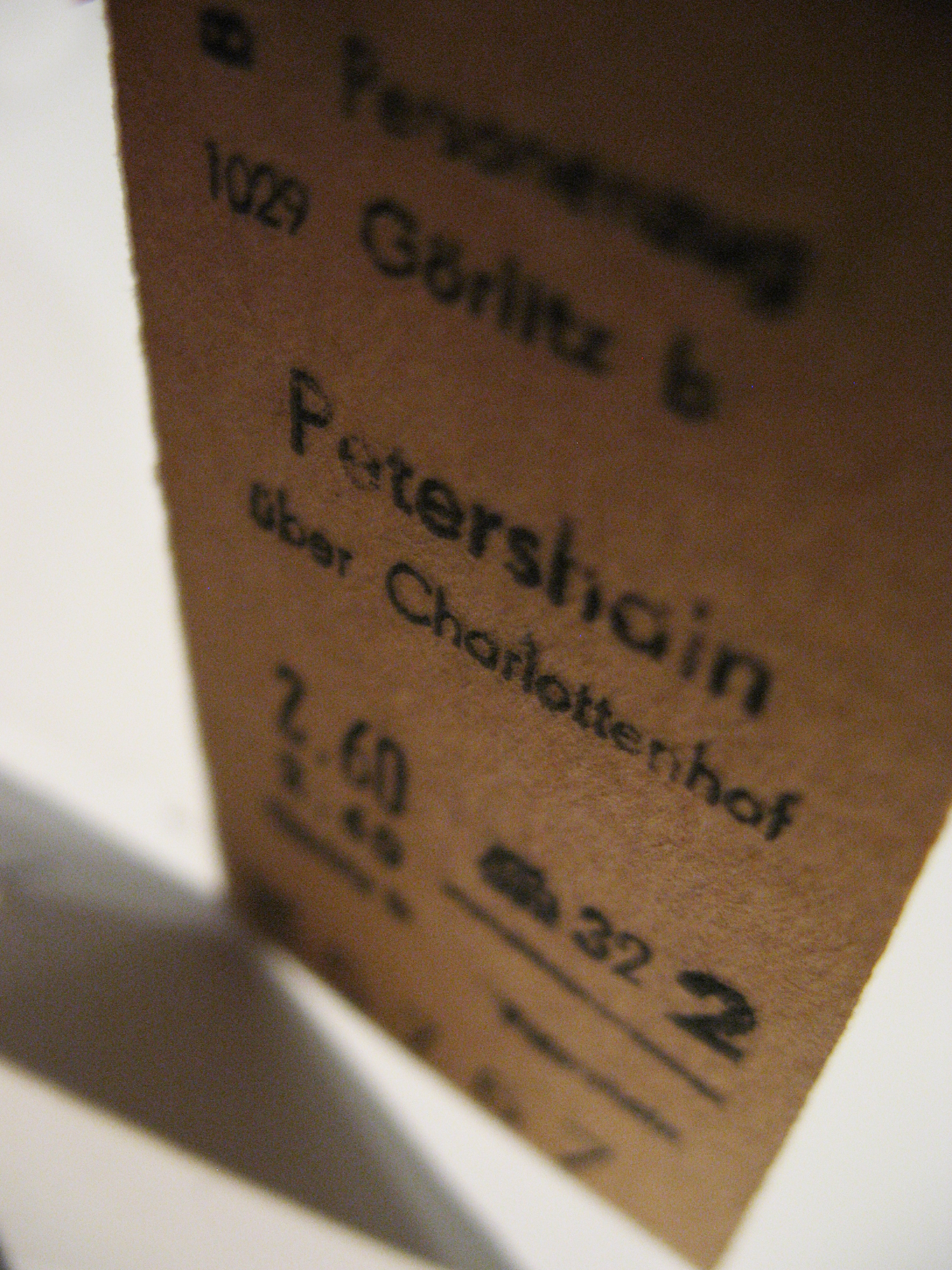 + 00000000001_Image_Fahrkarte_Deutsche Reichsbahn_DDR